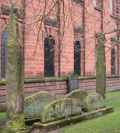 Penrith Giganten Grab